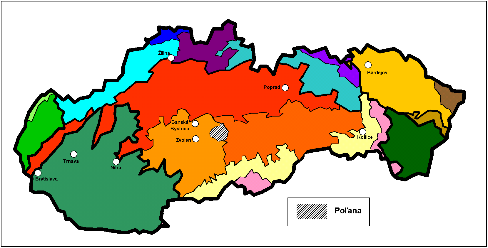 Polana